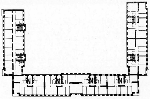 Віцебск. План дома камунальнага тыпу па вул. Суворава